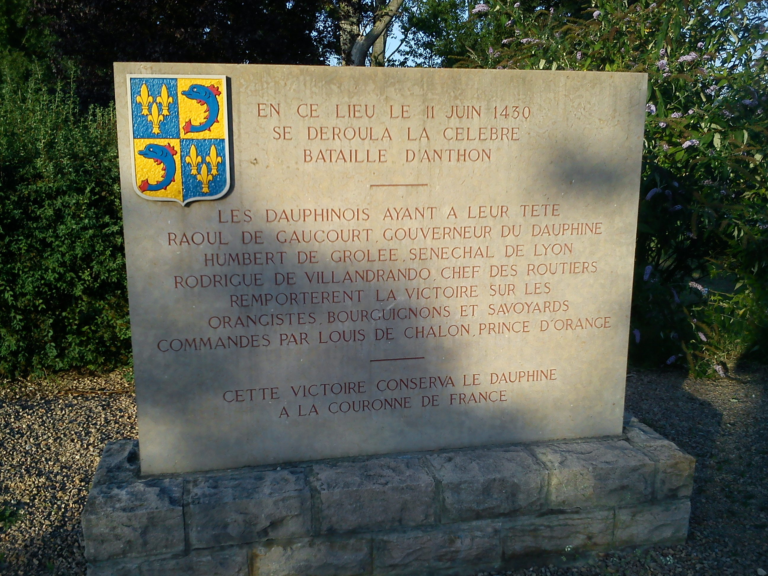 En ce lieu le 11 Juin 1430 se déroula la célèbre bataille d'Anthon. Les dauphinois ayant à leur tête Raoul de Gaucourt, gouverneur du Dauphiné; Humbert de Grolée, sénéchal de Lyon; Rodrigue de Villandrando, chef des Routiers; remportent la victoire sur les orangistes, bourguignons et savoyards commandés par Louis de Châlon, prince d'Orange. Cette victoire conserva le Dauphiné à la couronne de France.